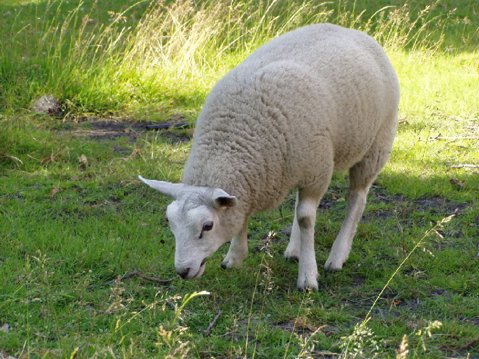 Texelaar. Dit is de grote versie van Schaapklein2.jpg. De tekst die erbij: "schaap - eigen opname, afgestaan aan WikipediaNL Amarant 22 jun 2003 19:27 (CEST)".